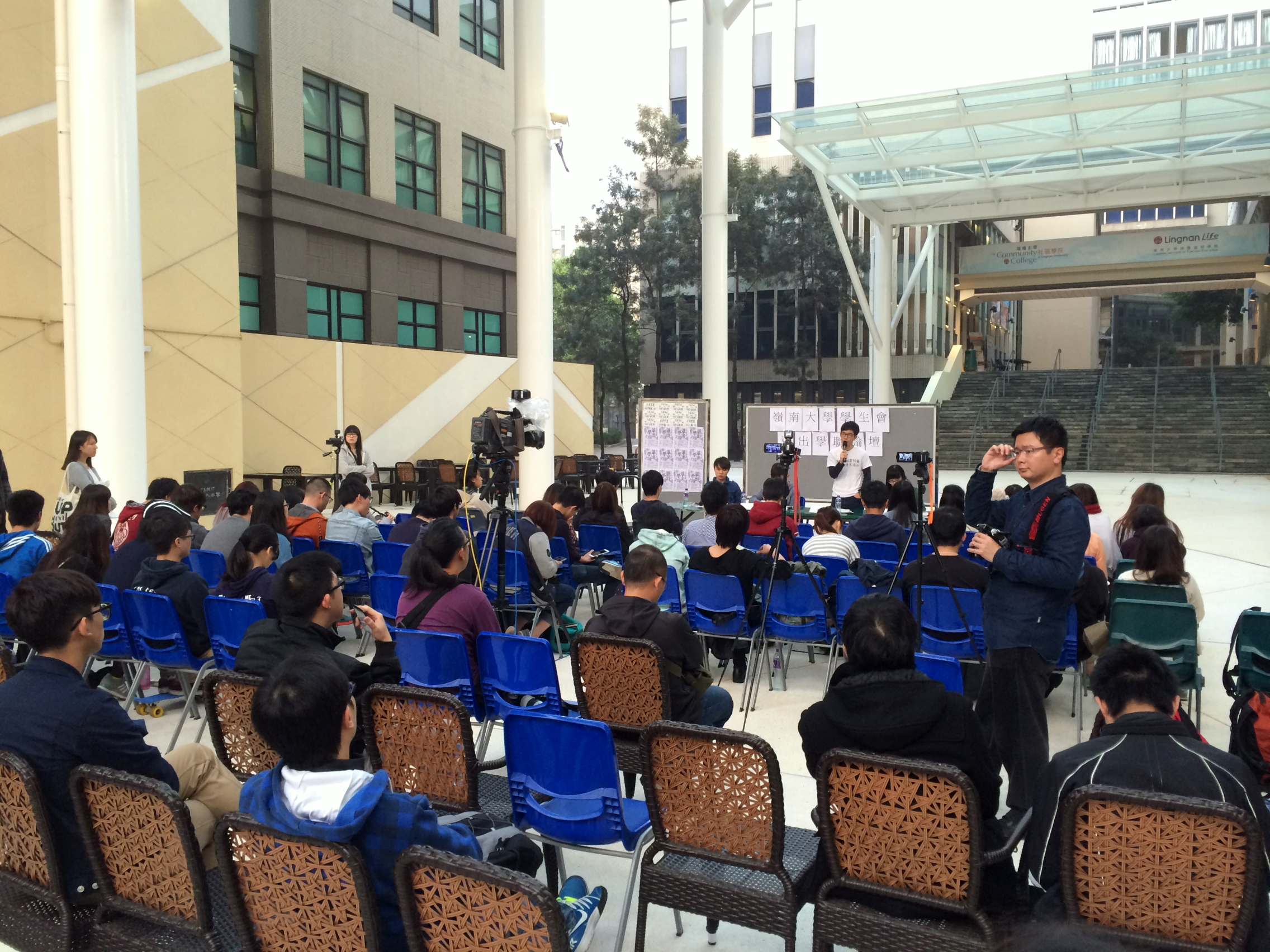 LingU Quit HKFS Forum